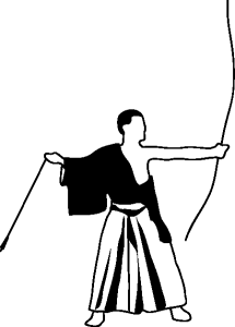 Kyudo-laukauksen jälkeinen asento, zanshin. (Heki Ryu Insai Ha -tyyli, tavallisen harjoitusasun sijasta edistyneen ampujan käyttämä kimono)